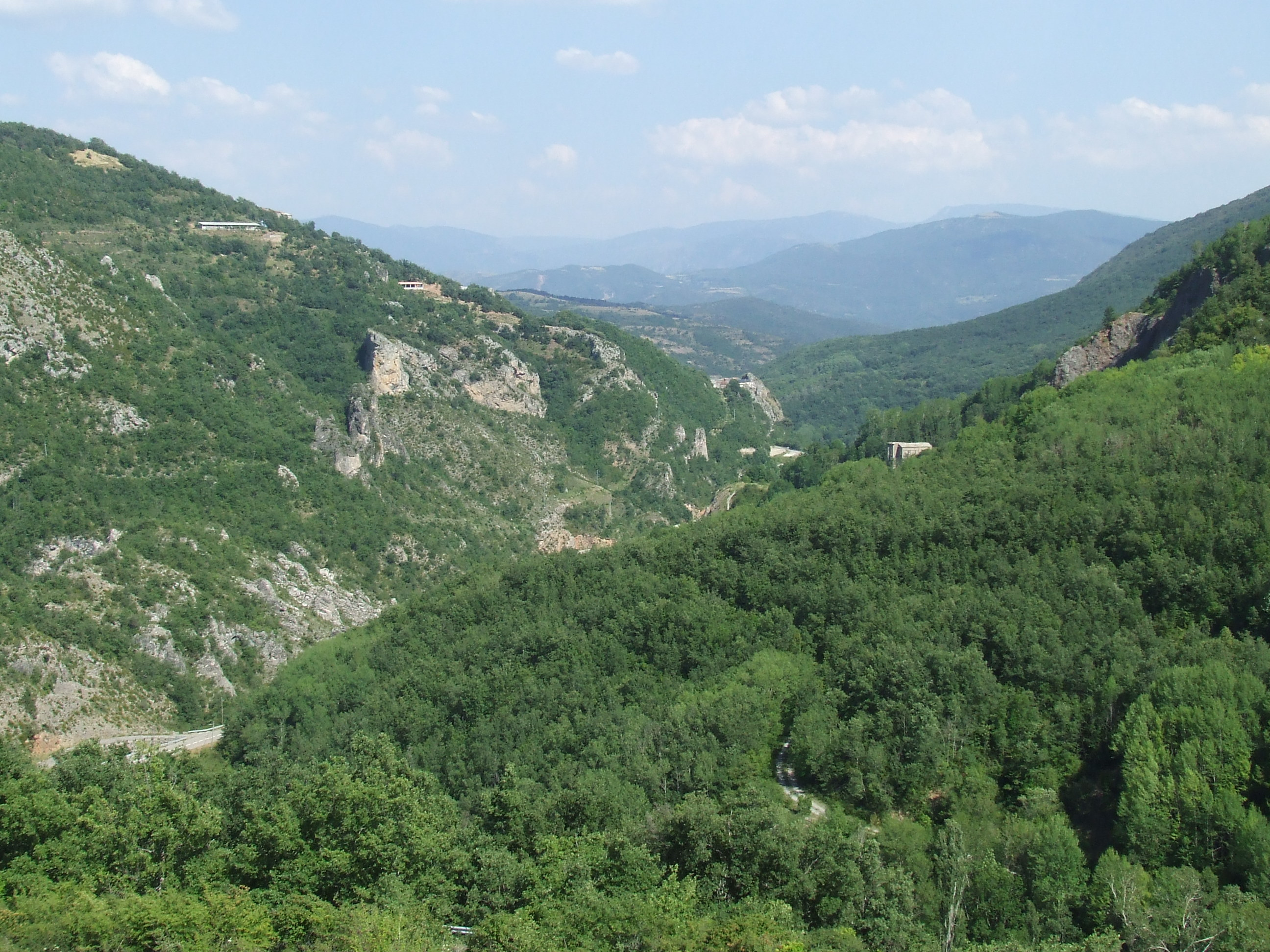 Primer tram de la vall del riu Bòssia (Sarroca de Bellera, Pallars Jussà)